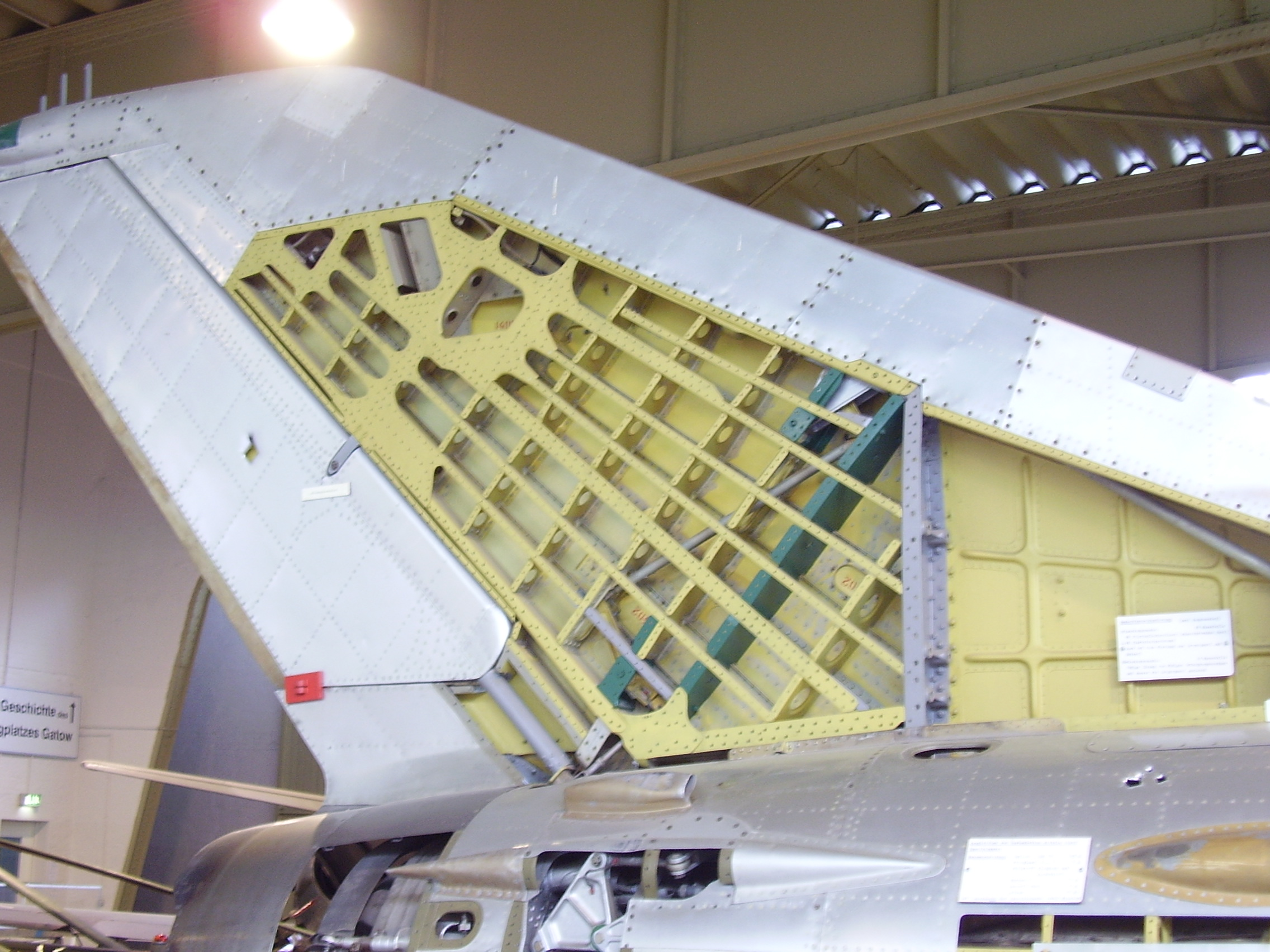 Luftwaffenmuseum der Bundeswehr; Airforce Museum of the Bundeswehr; Berlin-Gatow